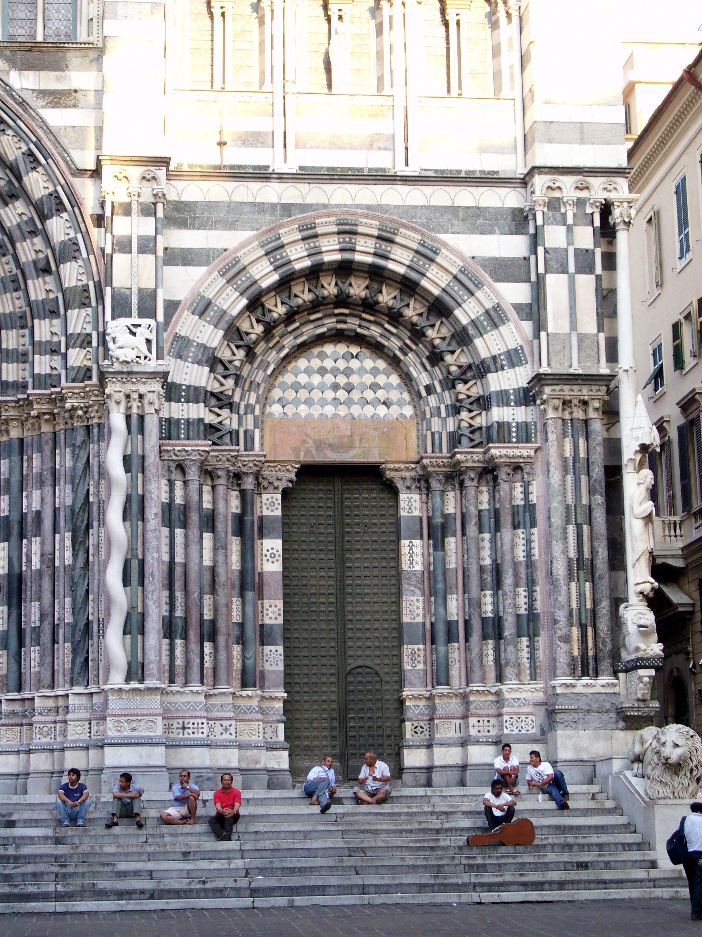 Chiesa di San Lorenzo a Genova, portone destro